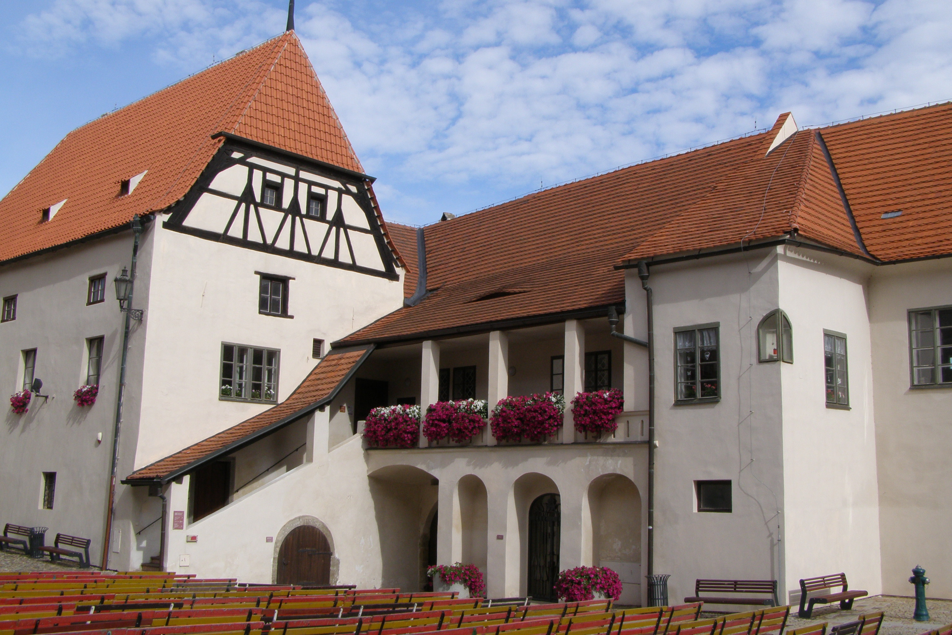 Strakonice - hrad